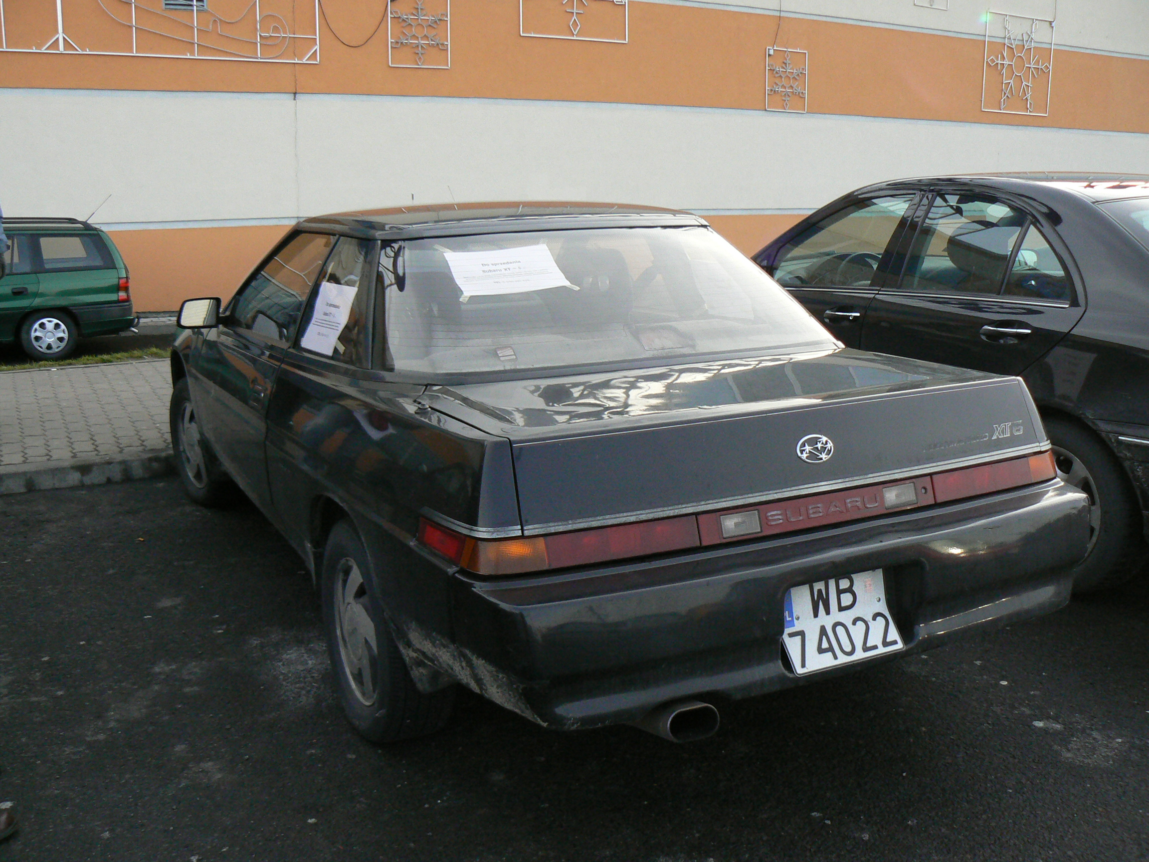 Black Subaru XT6.